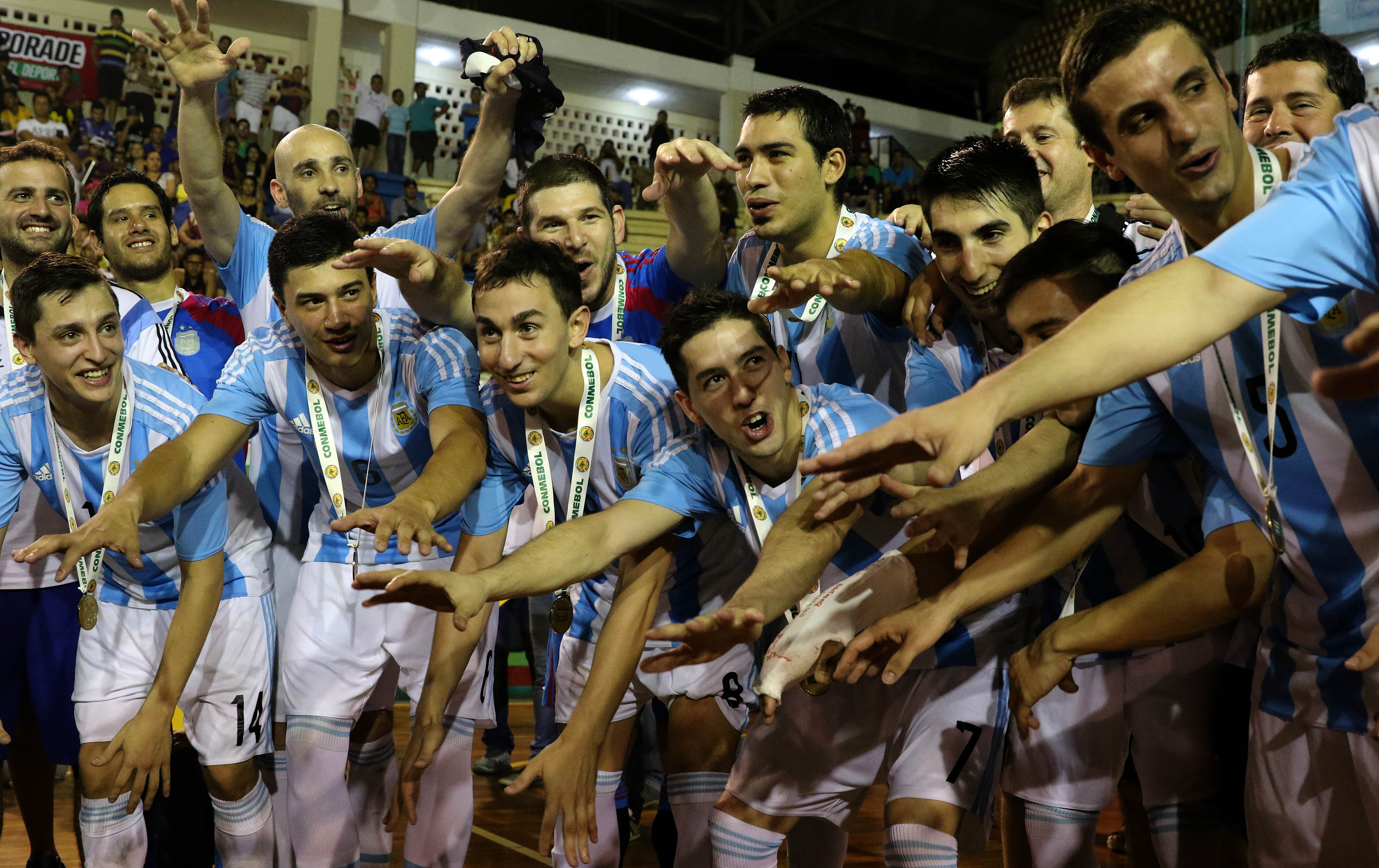 Portoviejo, Manabí, 30 de ago del 2015 (Andes).-La selección de Argentina se adjudicó el campeonato de la Copa América al derrotar 4x1 a la selección de Paraguay. Foto:César Muñoz/Andes